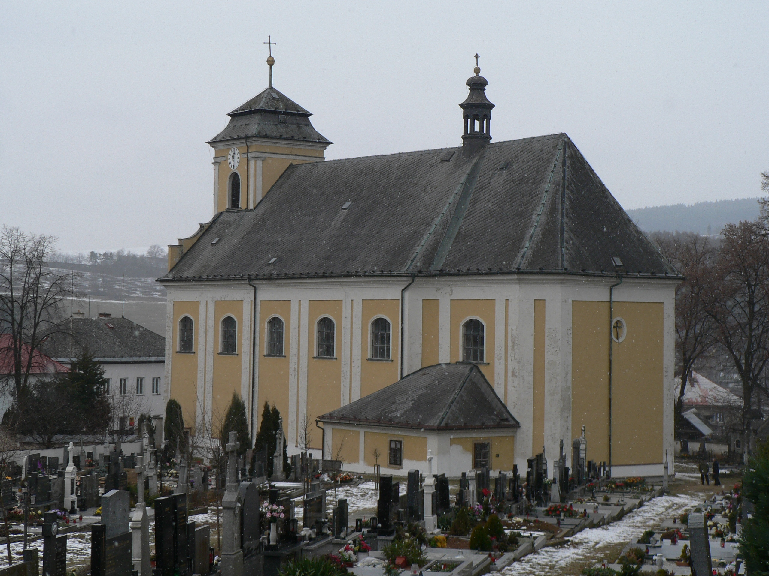 Kostel svatého Vavřince (Nová Hradečná)